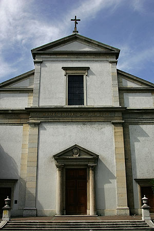 Olten: christ-kath. Stadtkirche